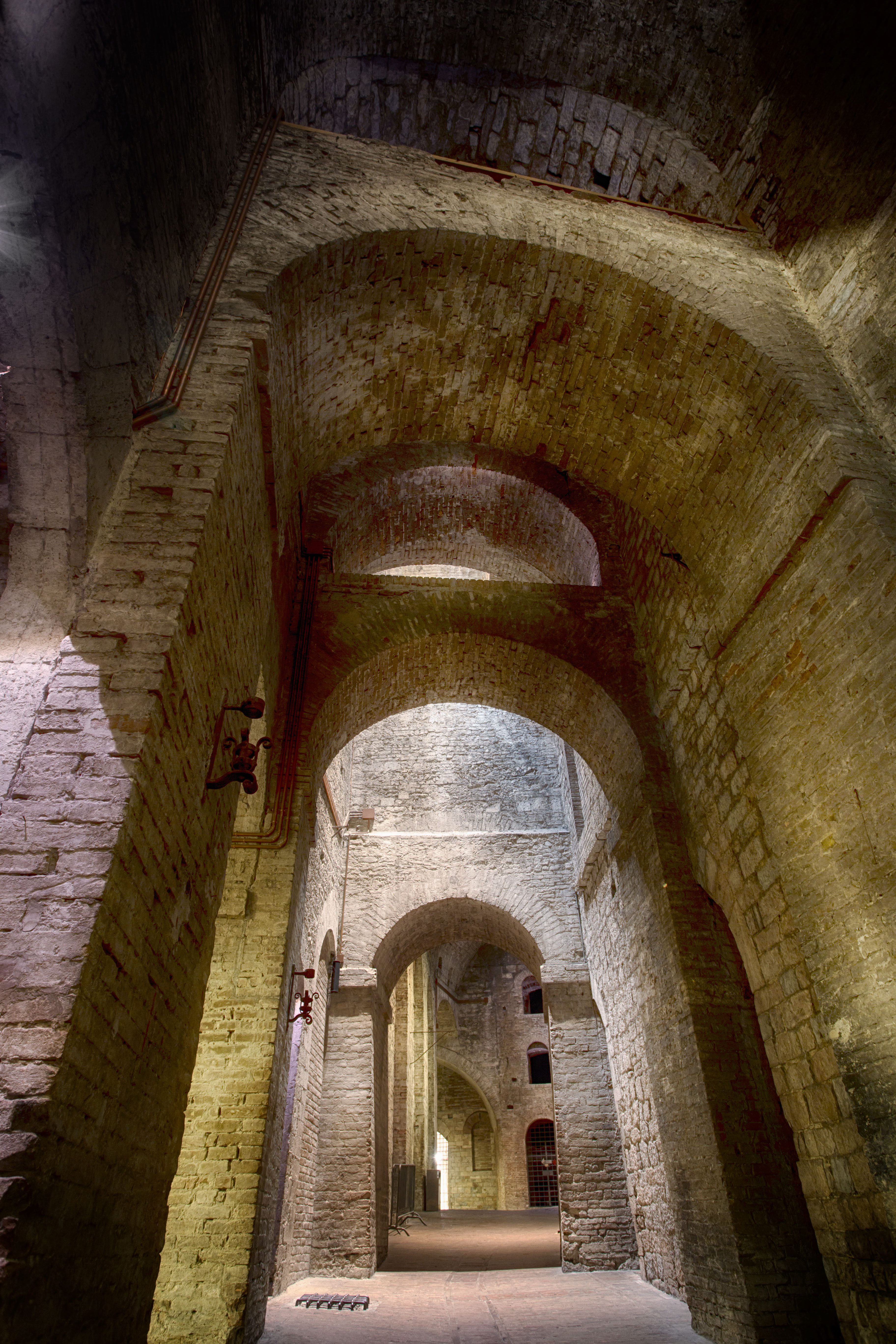 Rocca Paolina This is a photo of a monument which is part of cultural heritage of Italy.